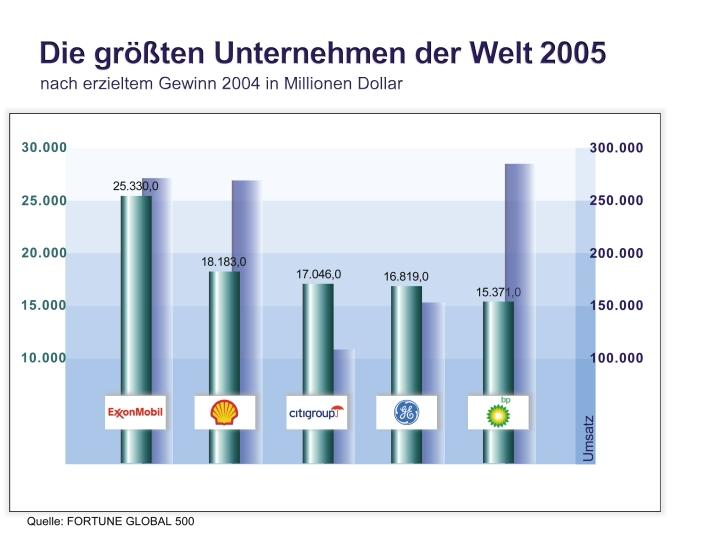 Die fünf größten Unternehmen der Welt